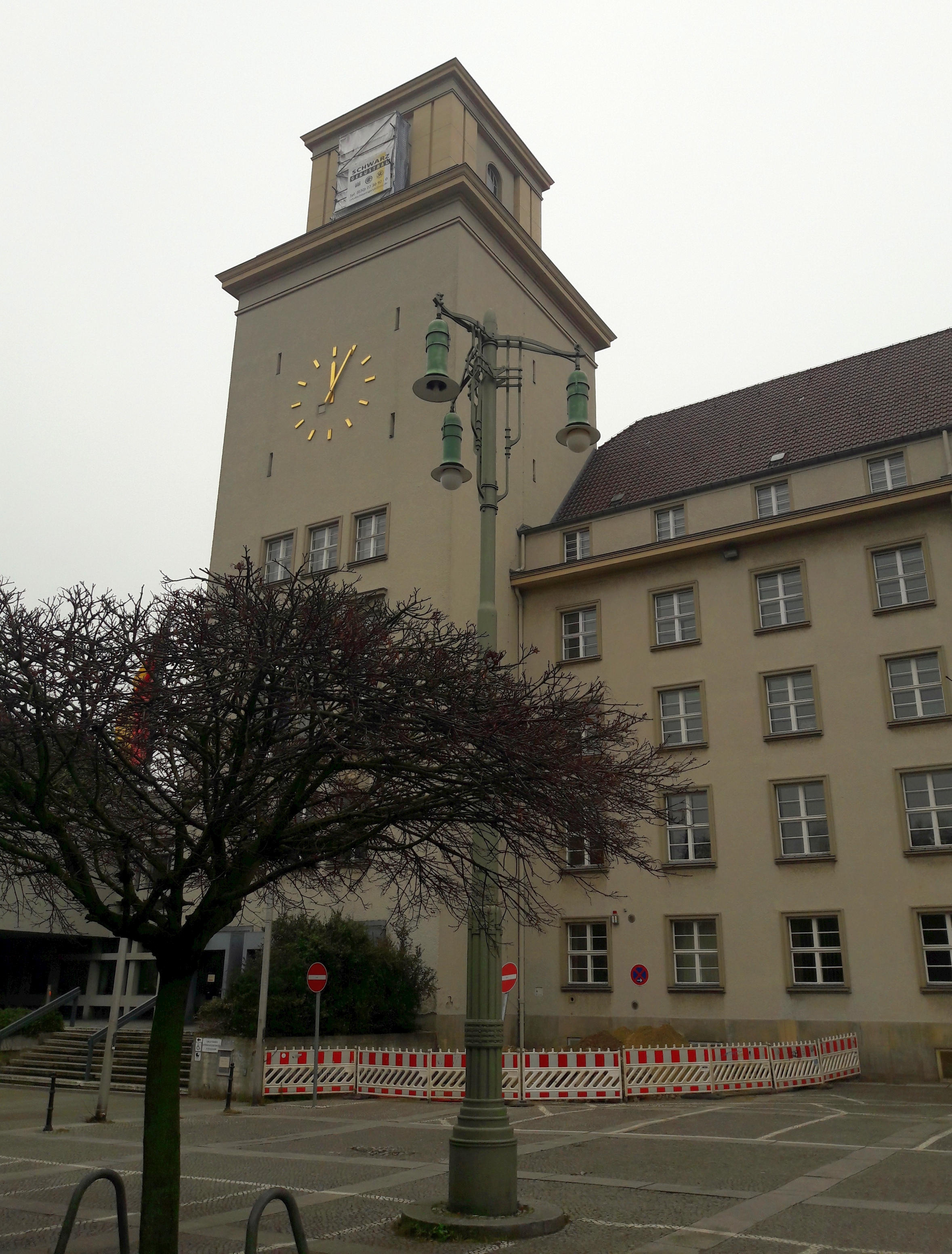 alter Bogenlampenkandelaber auf dem Vorplatz vom Rathaus Tempelhof, Januar 2020